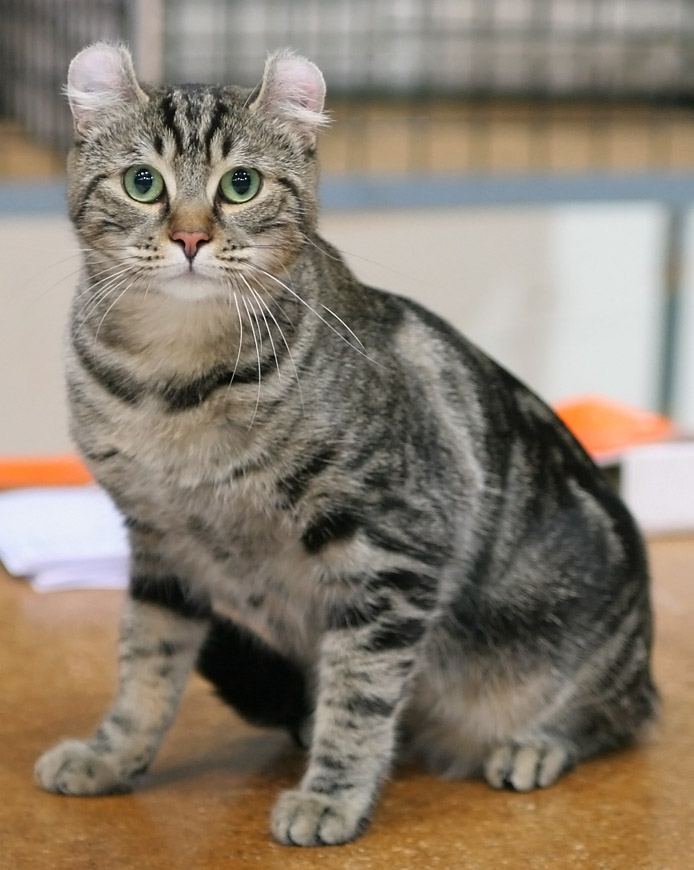 Un american curl à poil court à l'exposition féline d'Helsinki en 2006. Code EMS : GIC Minnikatin Zelta [ACS n 22] female EX1 CAGCIB GIC